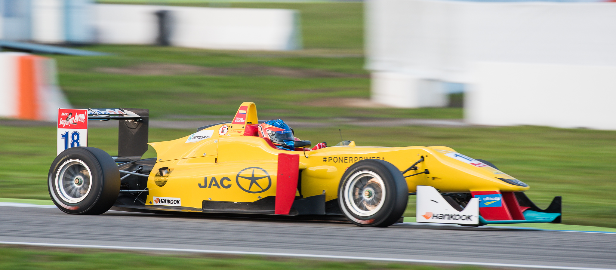 DTM,Dallara F312,Deutsche Tourenwagen Masters,F3 FIA European Championship,FIA Formel 3 Europameisterschaft,Hockenheimring,Jo Zeller Racing,Mercedes-Benz,Motorsport,Tatiana Calderon,Tatiana Calderón